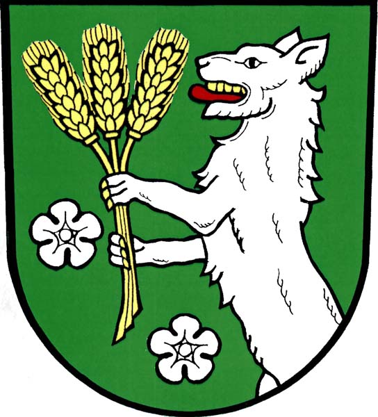 Znak obce Vlčice (okres Jeseník)